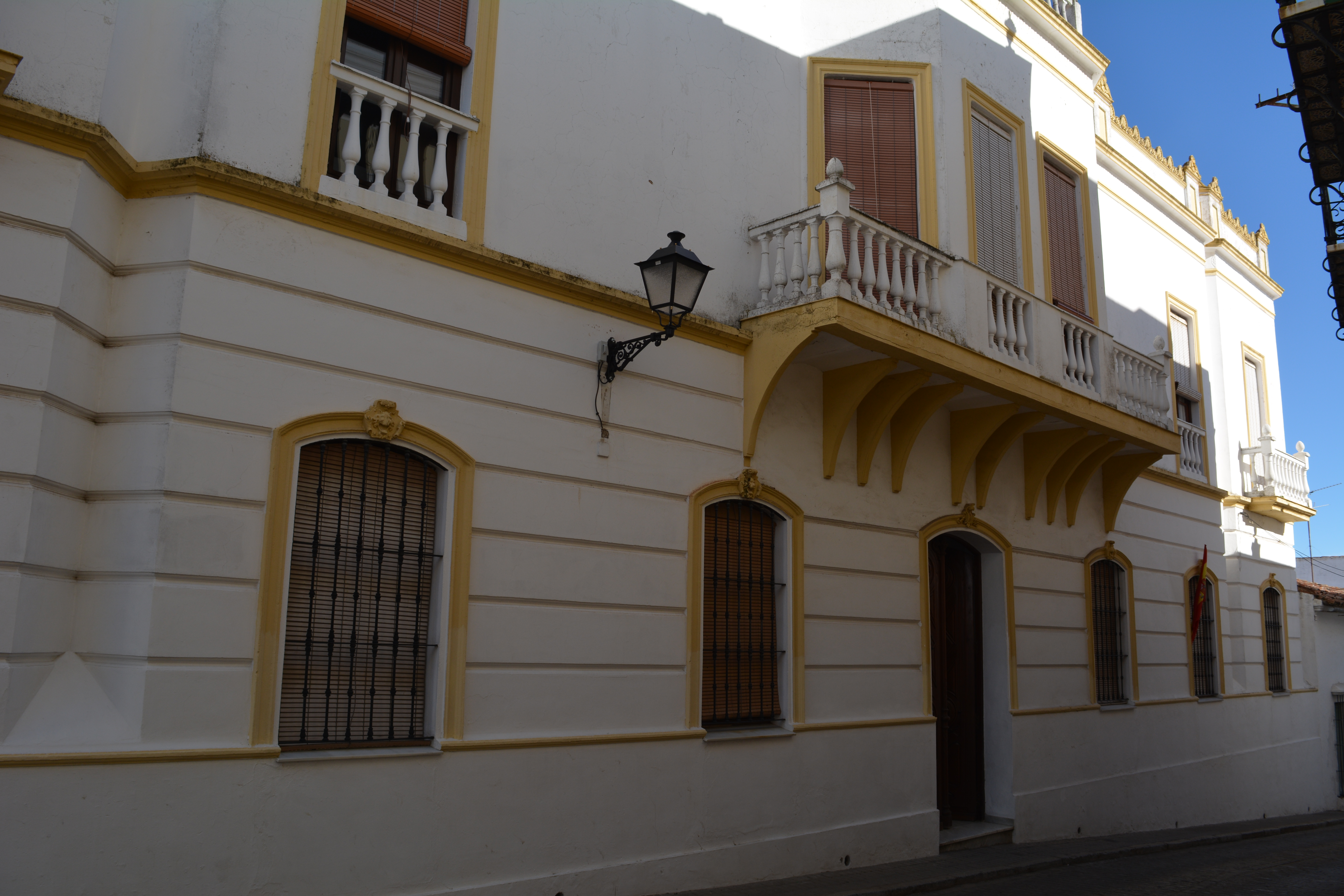 Fregenal de la Sierra (Badajoz). Vista parcial de la vivienda n.º 1 de la calle Segura, conocida aun en la actualidad como "Casa de Catón".